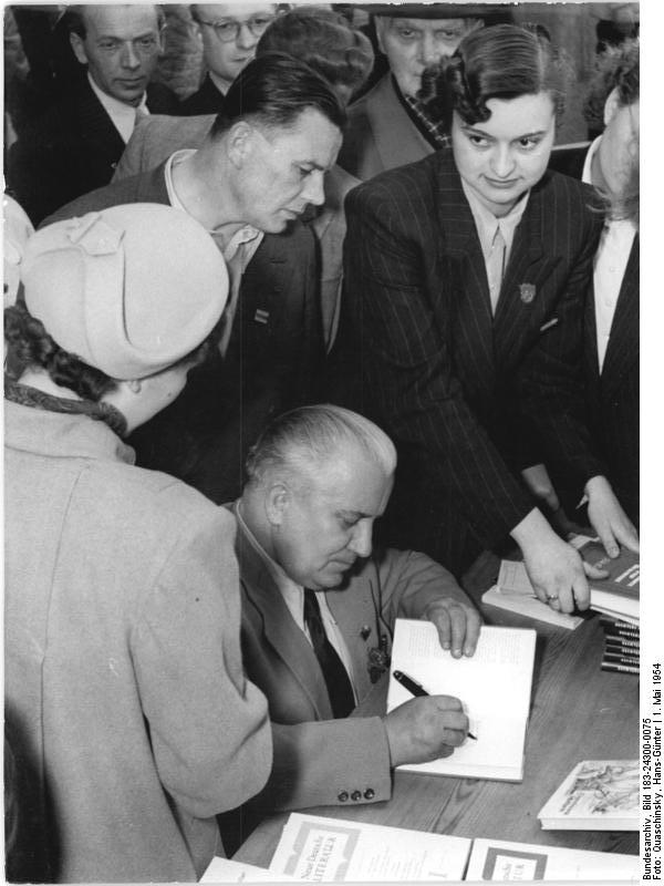 Zentralbild Quasch 1.5.1954 Am Nachmittag des 1. Mai 1954 fand in der Karl-Marx-Allee, Berlin, in und vor der Karl-Marx-Buchhandlung ein Schriftsteller-Basar statt. UBz: Der Schriftsteller Willi Bredel gibt Autogramme